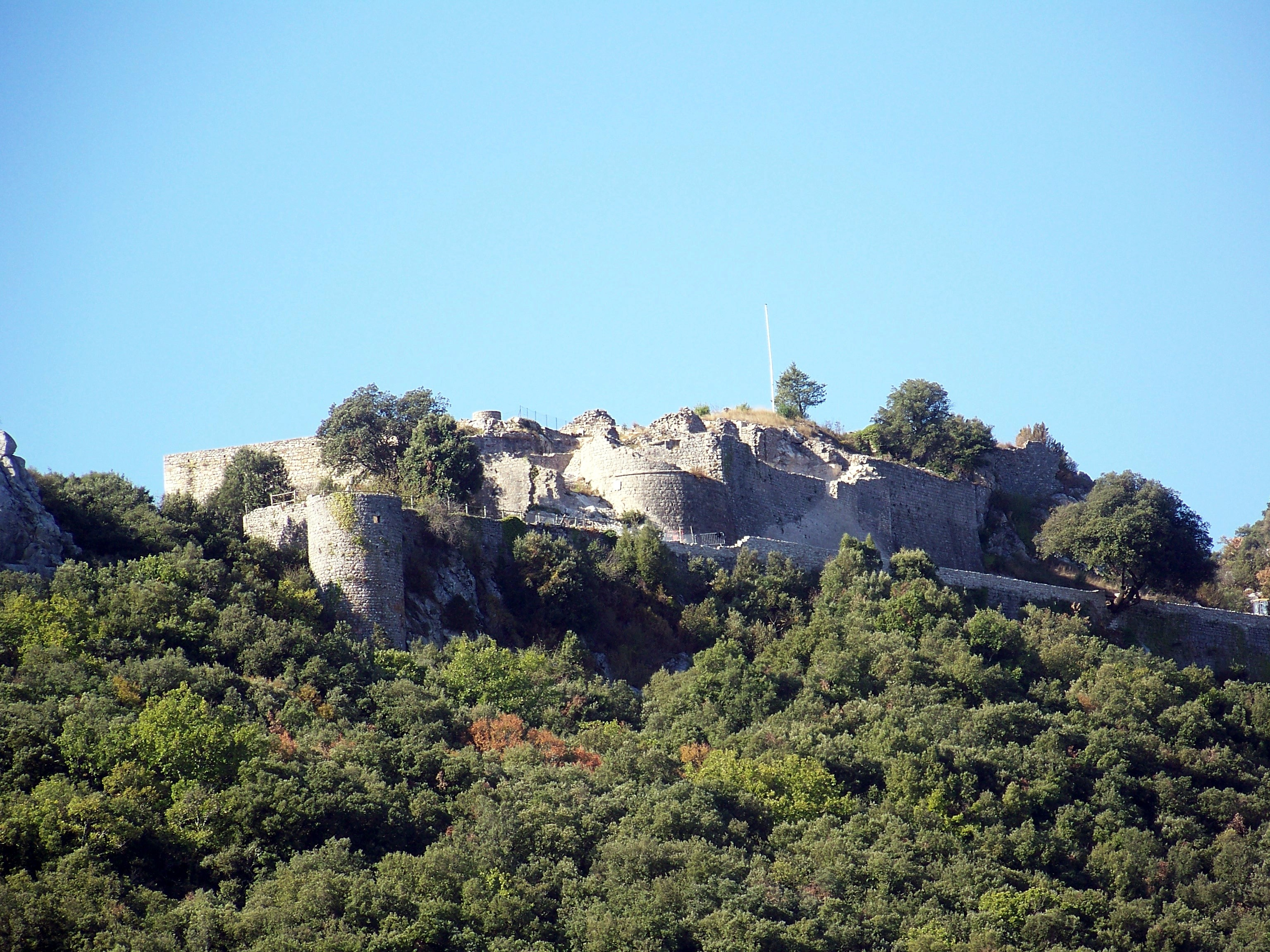 Vue des ruines du château des Grimoard du Roure